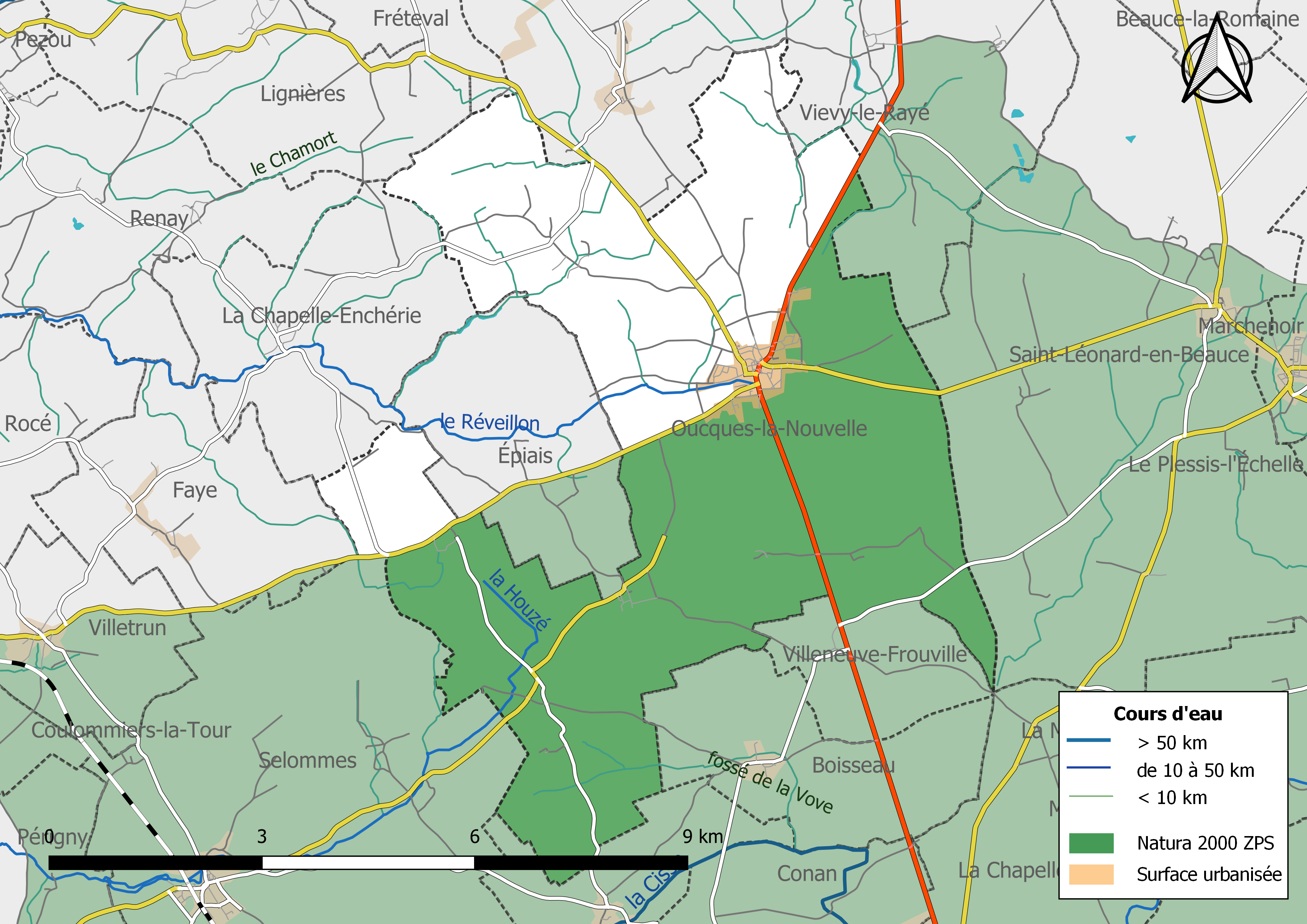 Carte des zones Natura 2000 de type ZPS de la commune de Oucques-la-Nouvelle (France).